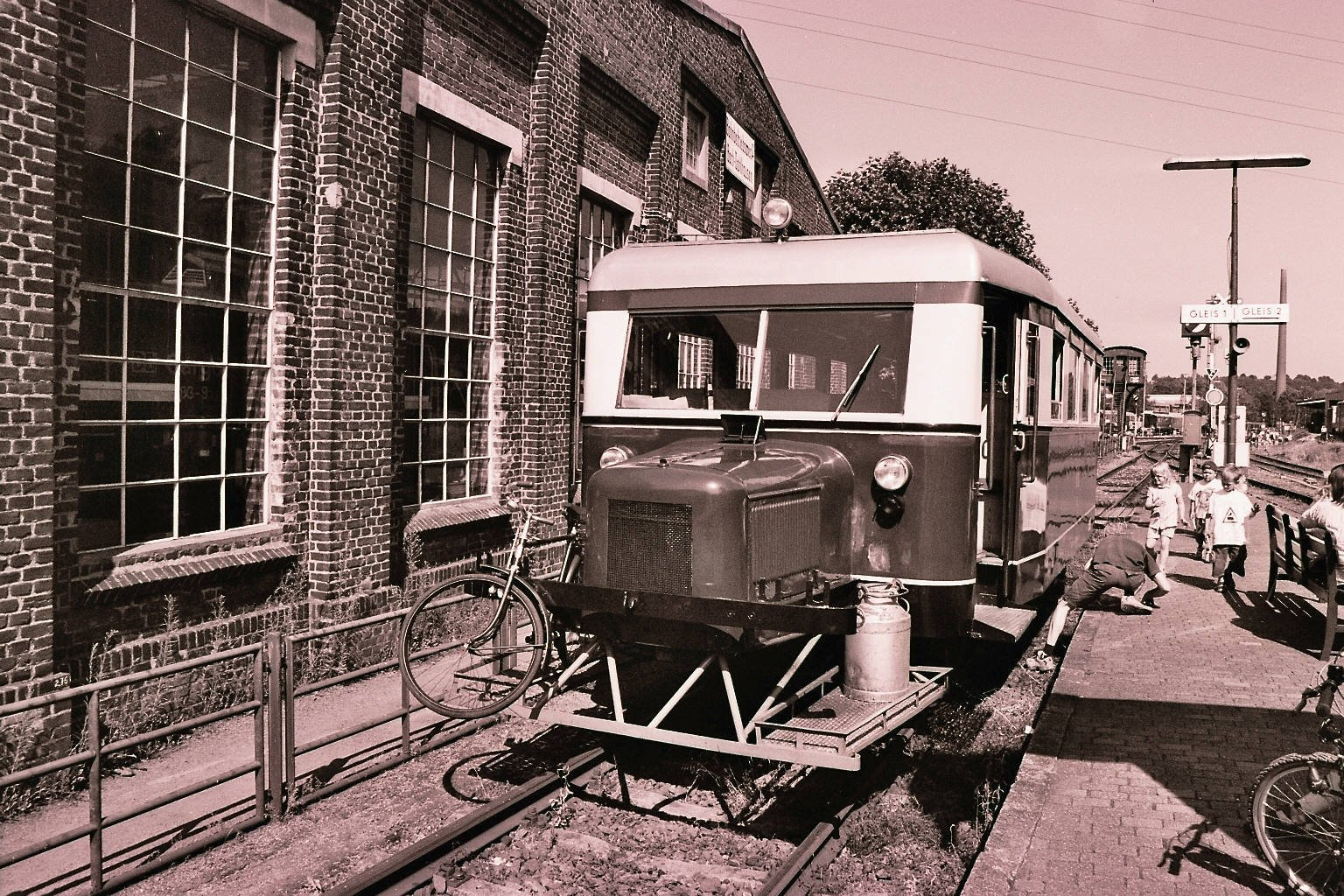 Historischer Schienenbus im Eisenbahnmuseum Dahlhausen